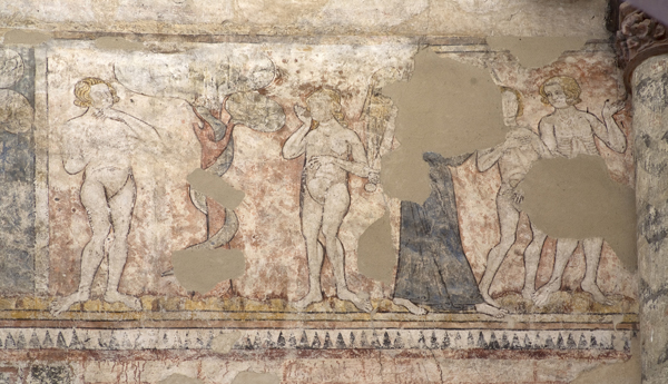 Cahors (Lot, France), cathédrale saint Étienne, fresques La Création et Le Péché originel.